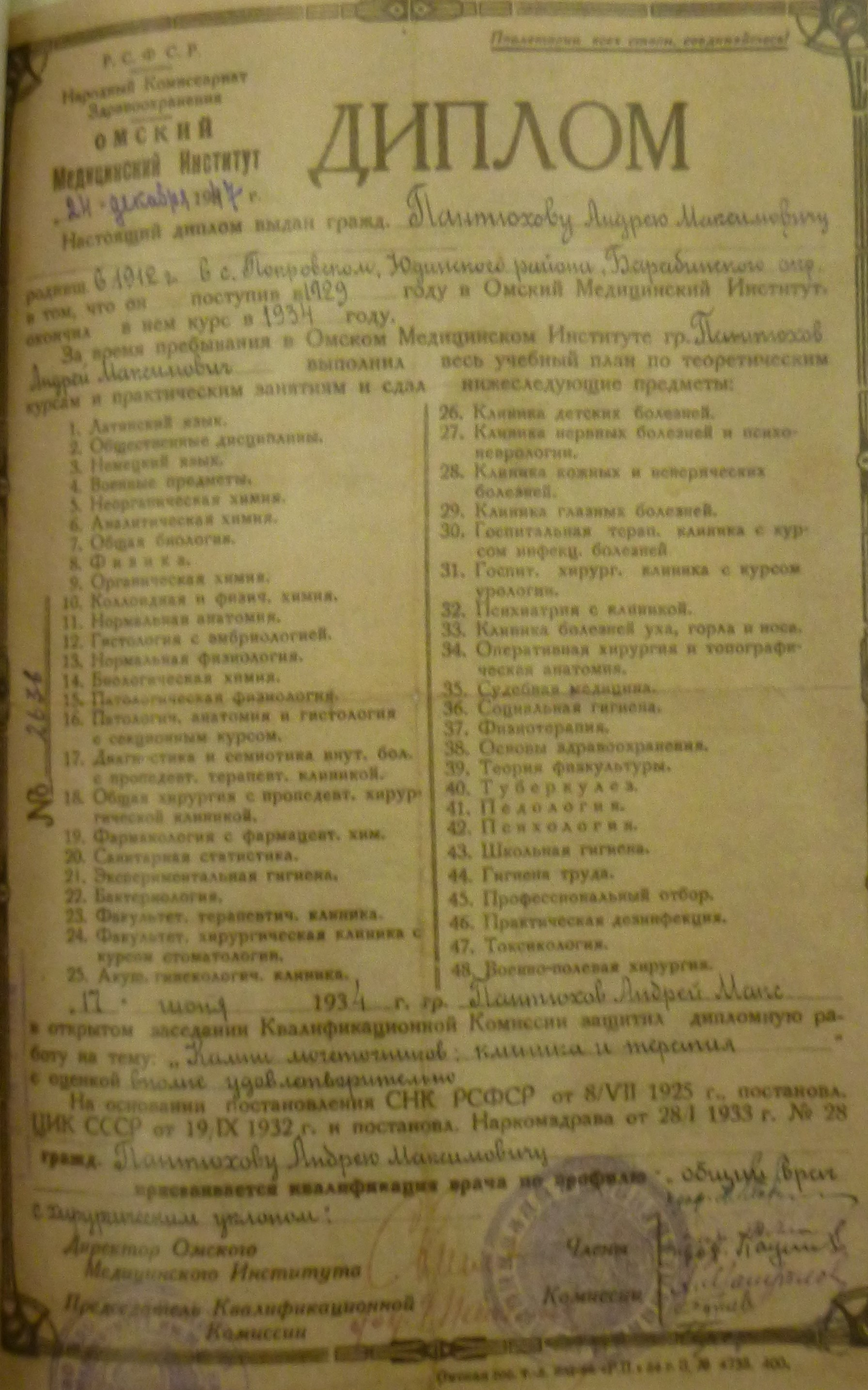 Диплом Омского медицинского института Андрея Михайловича Пантюхова, выданный 24 декабря 1947 года и защищенный 17 июня 1934 году